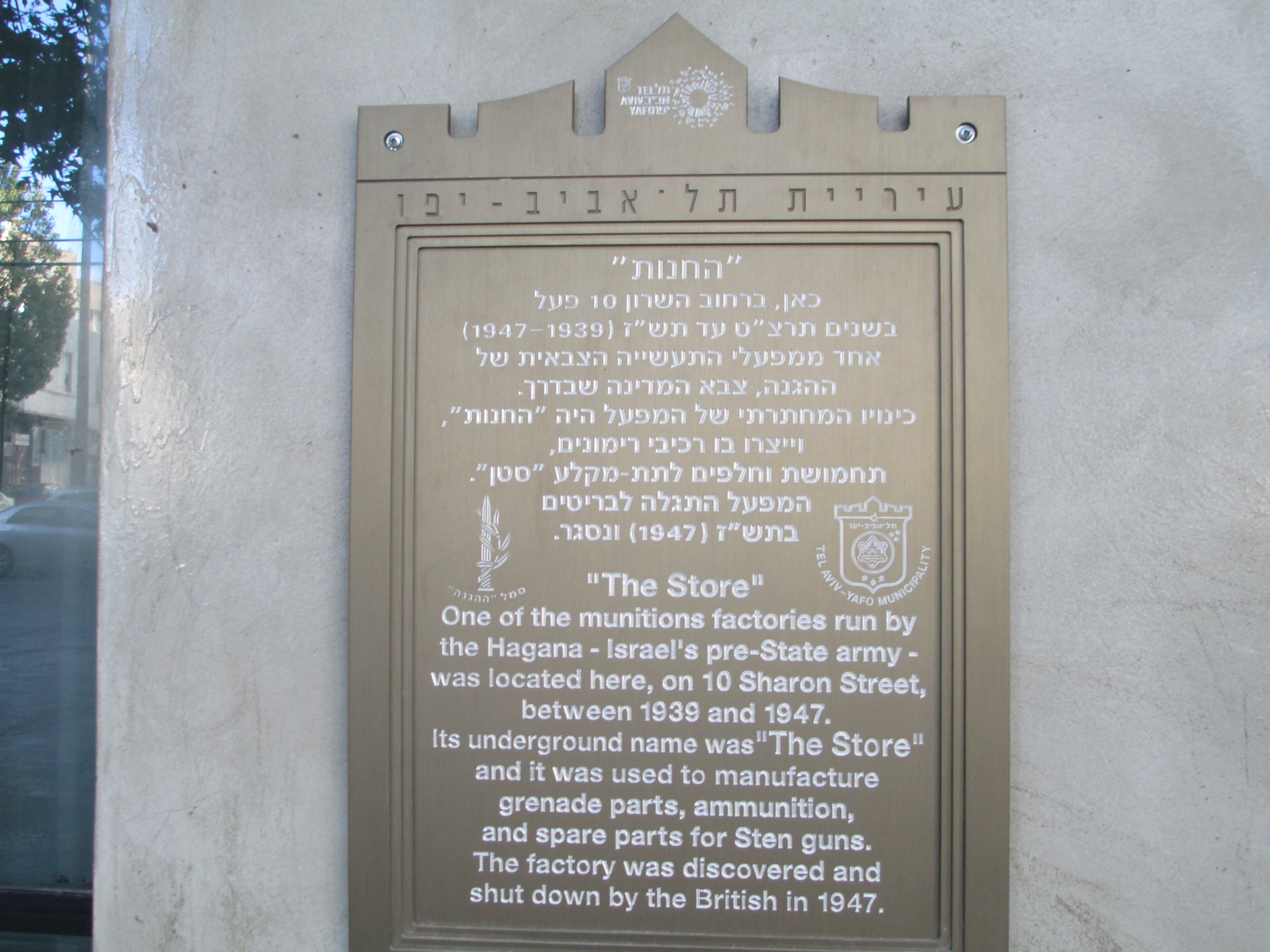 לוחית זיכרון למפעל הנשק של ההגנה "החנות" ברחוב השרון 10 בתל אביב